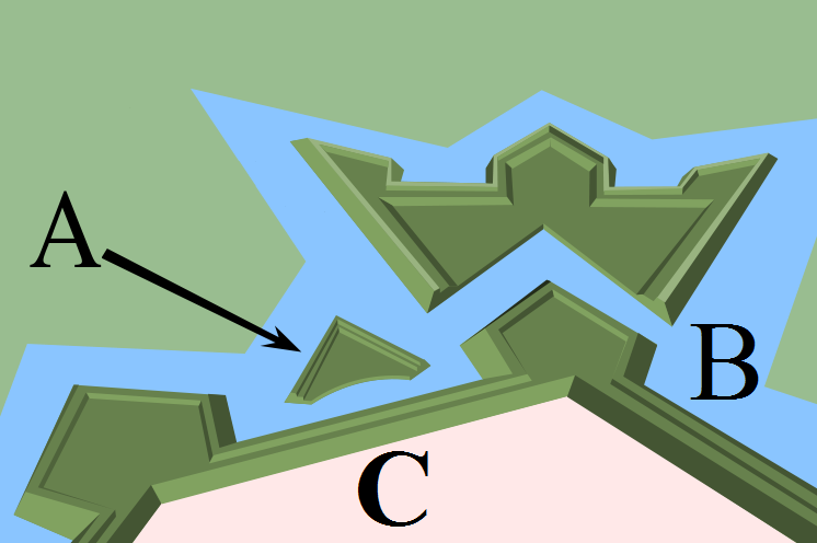 Obwód obronny o narysie bastionowym: rawelin (A), fosa (B) i kurtyna (C) między bastionami.